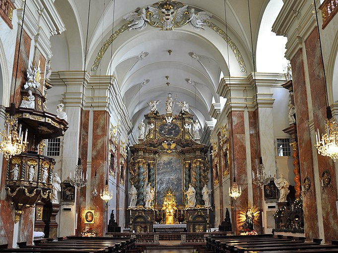 Rochuskirche Wien, Innenansicht